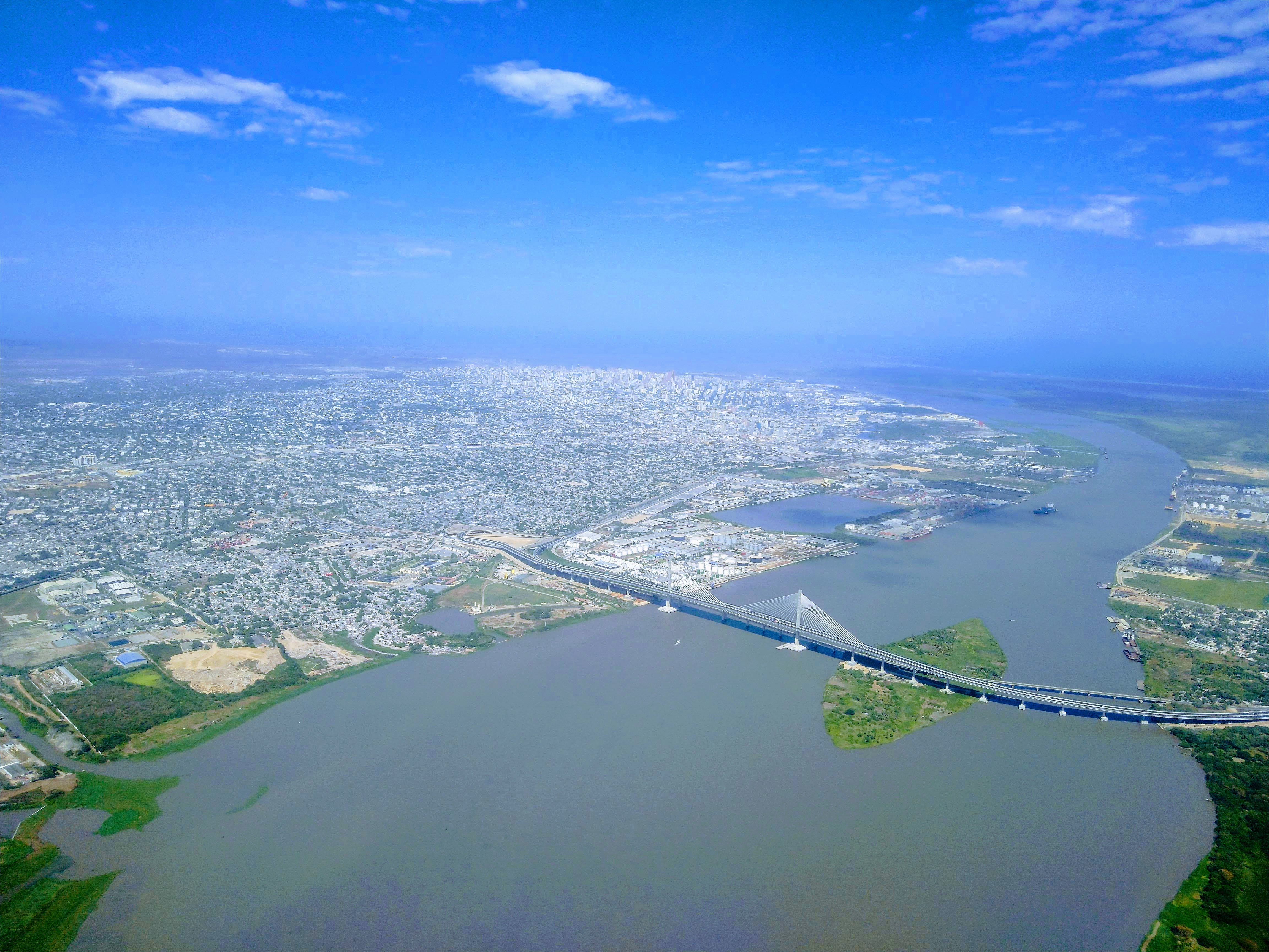 Panorámica de Barranquilla - Colombia con el puente Pumarejo en primer plano